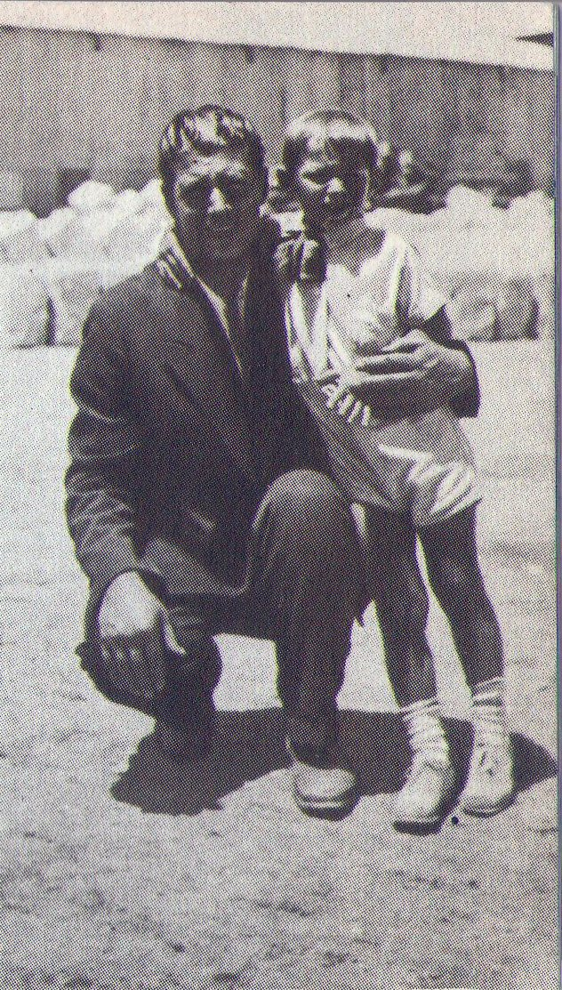 Иван Васильевич Комзин с сыном Борисом, Кайсери, Турция